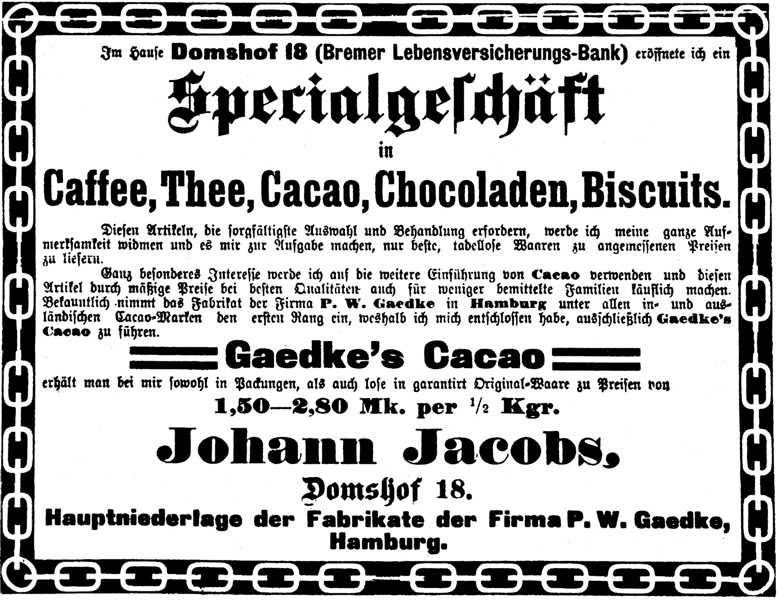 Johann Jacobs gibt die Eröffnung seines Geschäftes Domshof 18 bekannt. Transkription: Im Hause Domshof 18 (Bremer Lebensversicherungs-Bank) eröffnete ich ein Specialgeschäft in Caffee, Thee, Cacao, Chocoladen, Biscuits. Diesen Artikeln, die sorgfältigste Auswahl und Behandlung erfordern, werde ich meine ganze Aufmerksamkeit widmen und es mir zur Aufgabe machen, nur beste, tadellose Waaren zu angemessenen Preisen zu liefern. Ganz besonderes Interesse werde ich auf die weitere Einführung von Cacao verwenden und diesen Artikel durch mäßige Preise bei besten Qualitäten auch für weniger bemittelte Familien käuflich machen. Bekanntlich nimmt das Fabrikat der Firma P. W. Gaedke in Hamburg unter allen in- und ausländischen Cacao-Marken den ersten Rang ein, weshalb ich mich entschlossen habe, ausschließlich Gaedke’s Cacao zu führen. Gaedke’s Cacao erhält man bei mir sowohl in Packungen, als auch lose in garantirt Original-Waare zu Preisen von 1,50 – 2,80 Mk. per ½ Kgr. Johann Jacobs, Domshof 18. Hauptniederlage der Fabrikate der Firma P. W. Gaedke, Hamburg.